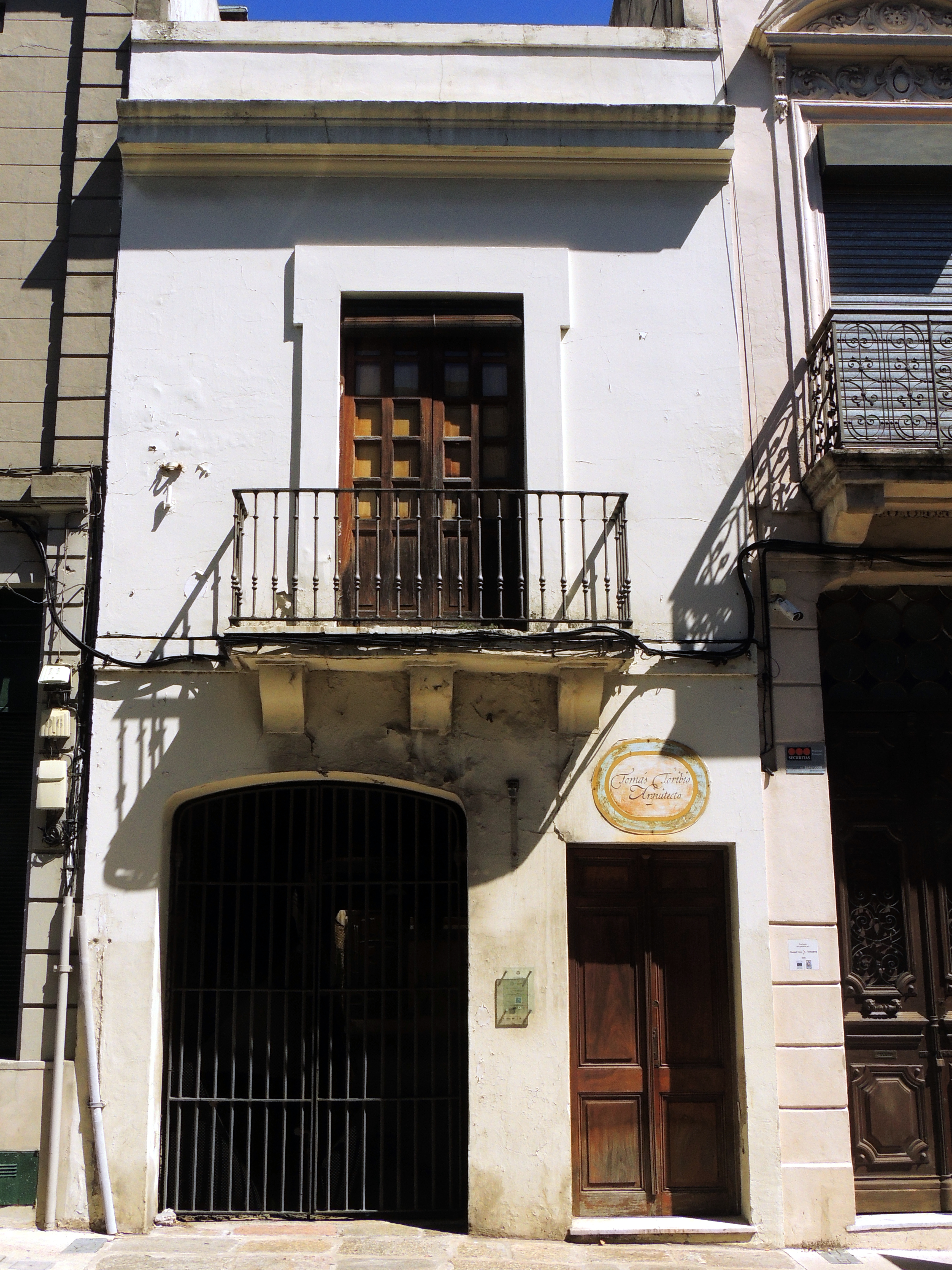 Denkmalgeschütztes Wohnhaus in Montevideo, Uruguay.